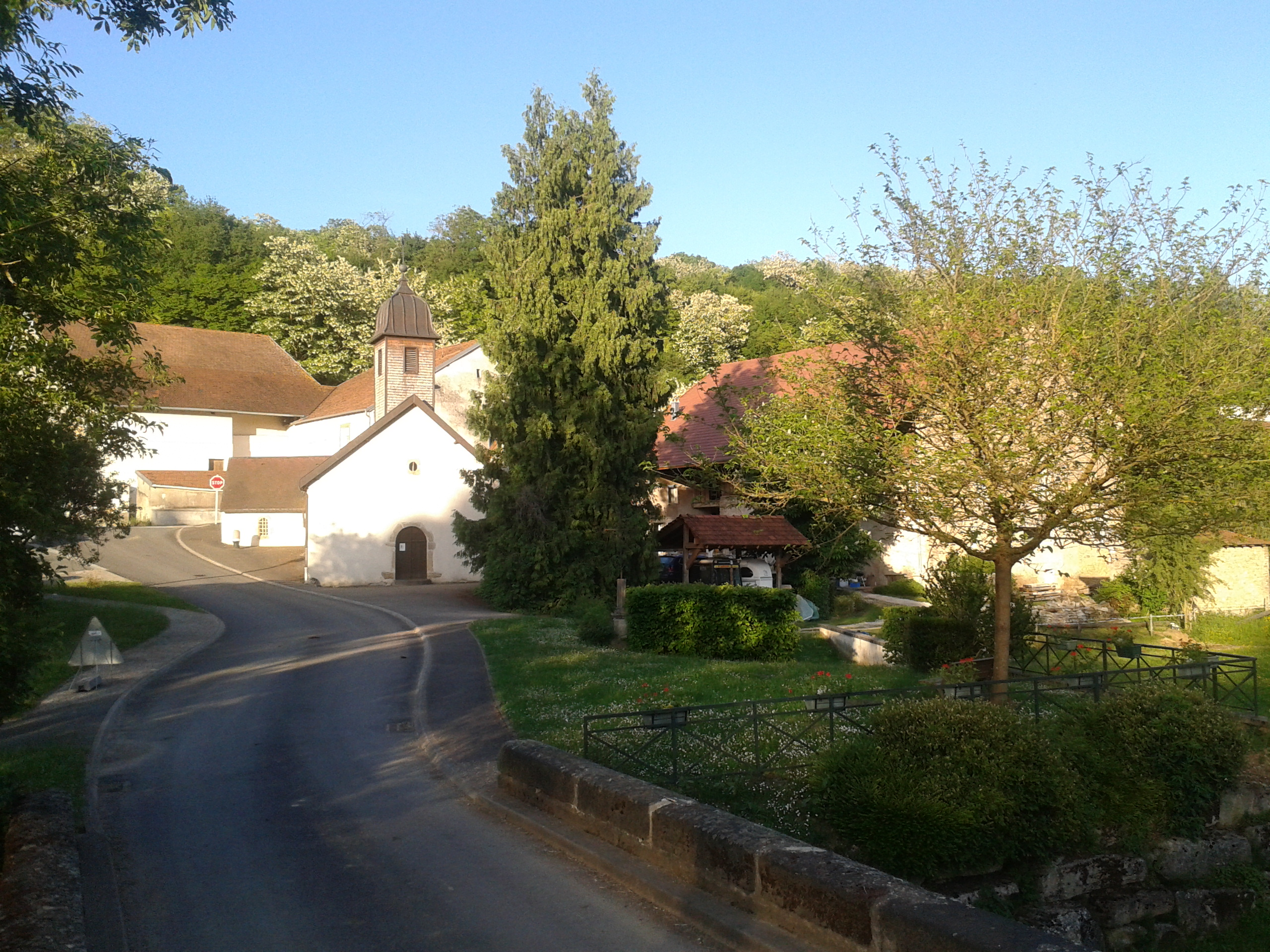 Le village de Villeparois